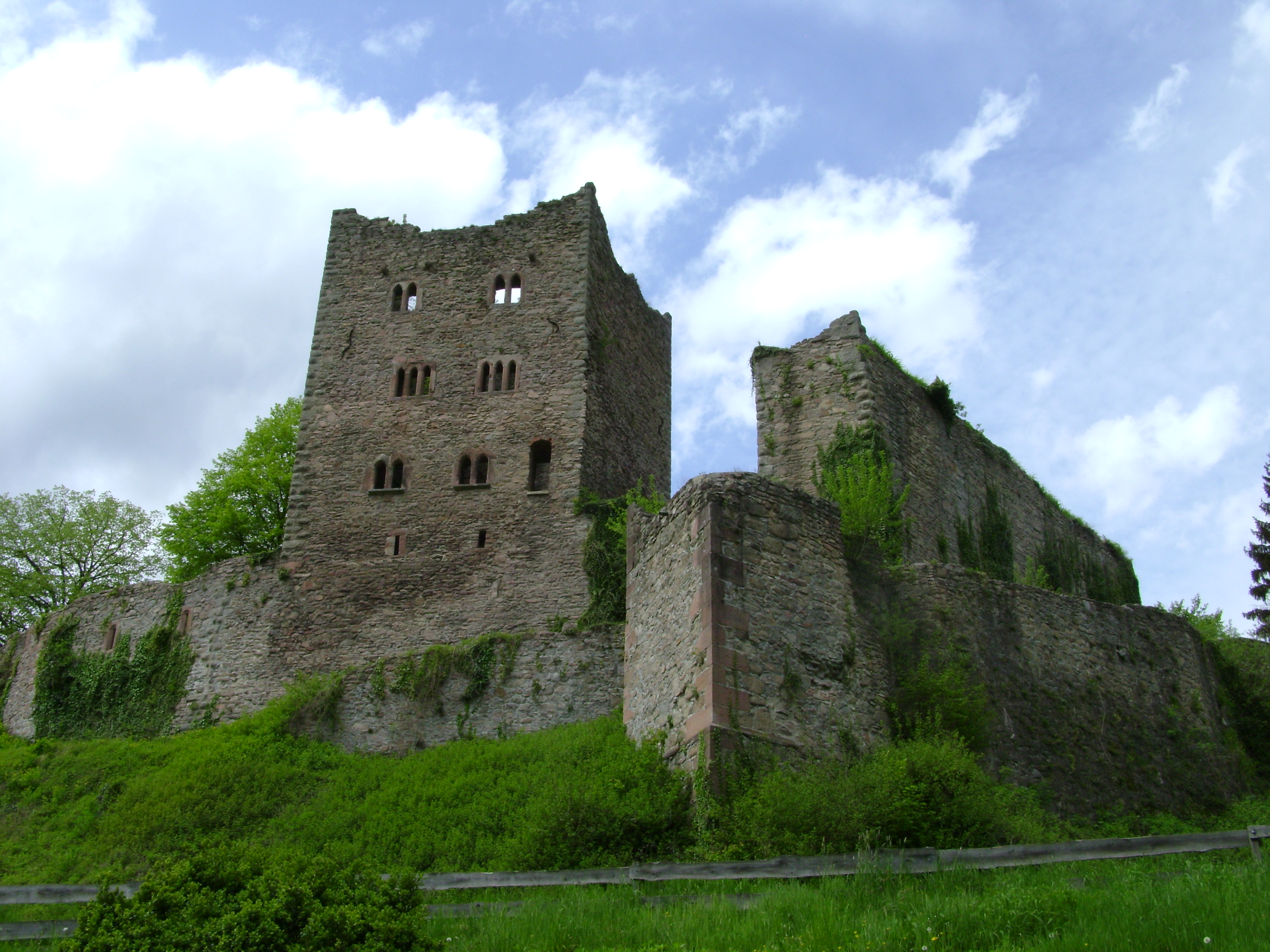 Ruines du Schauenburg (397m)au bord de la Forêt Noire en Allemagne